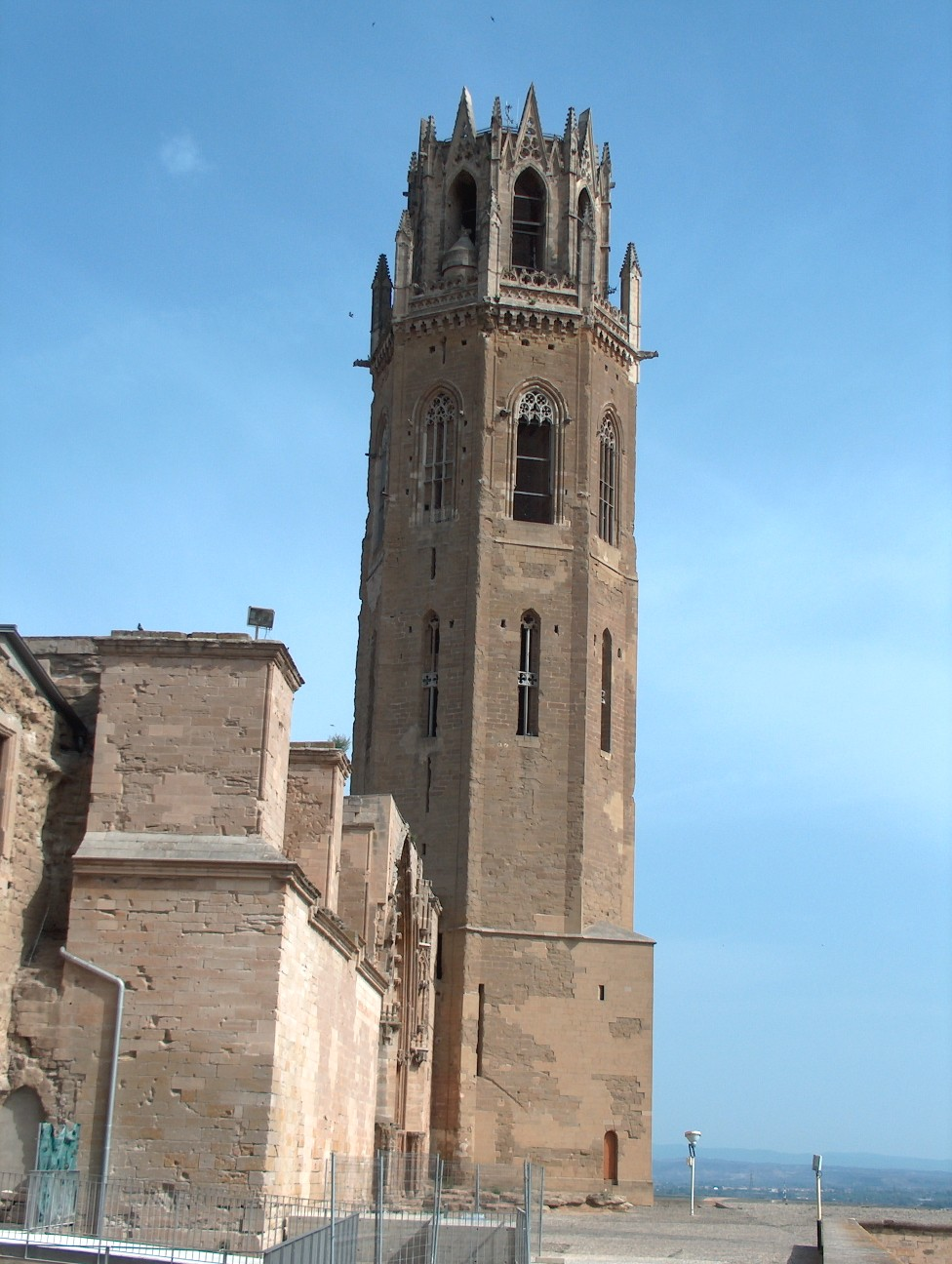 Sé Velha de Lérida. Sé Velha de Lérida em Espanha.